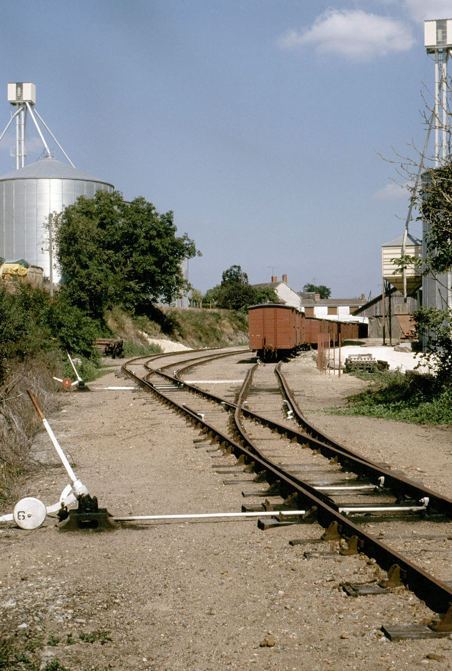 Schmalspurgüterwagen in Luçay-le-Mâle